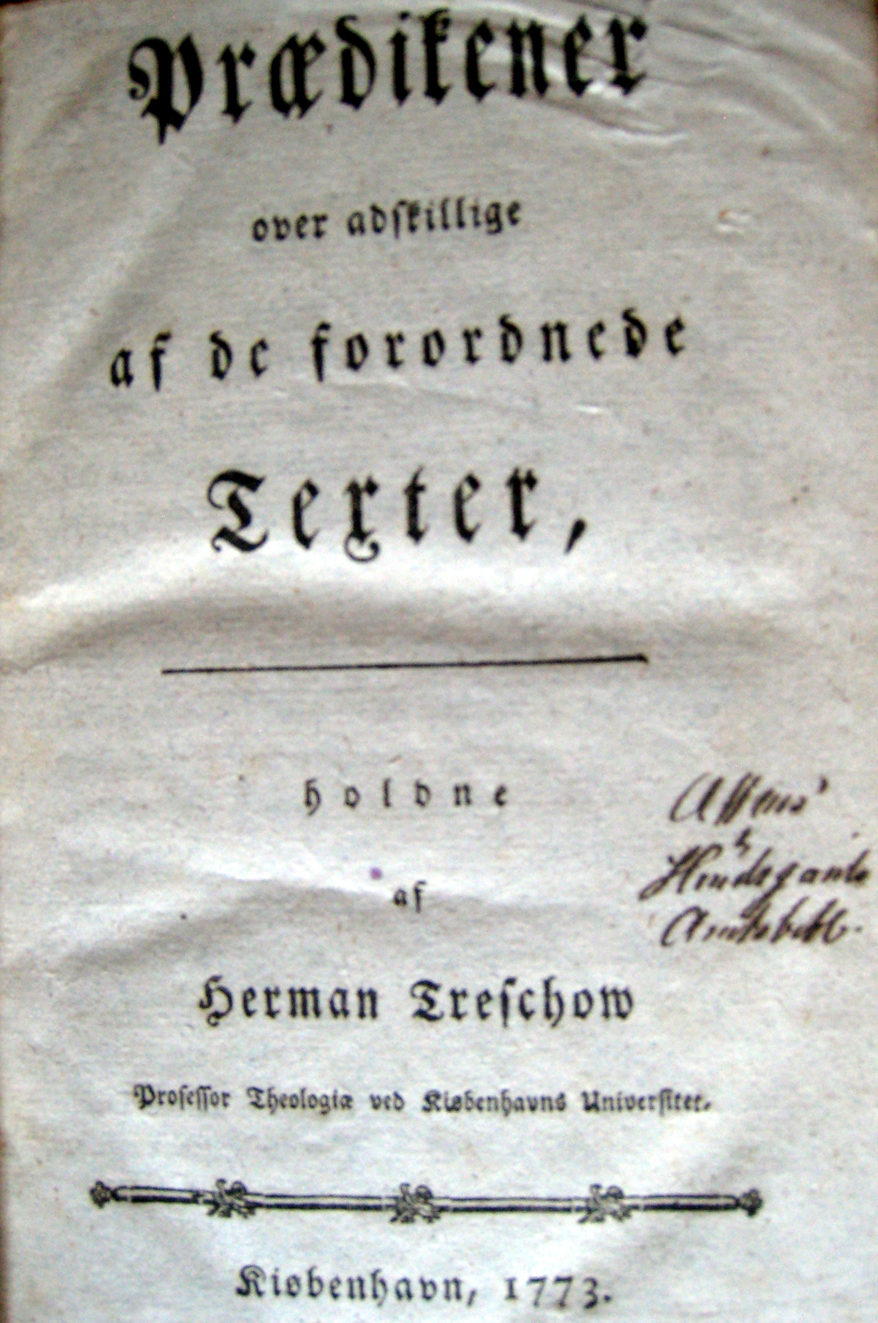 Tittelbladet til en av Herman Treschows prekenbøker, utgitt i 1773.